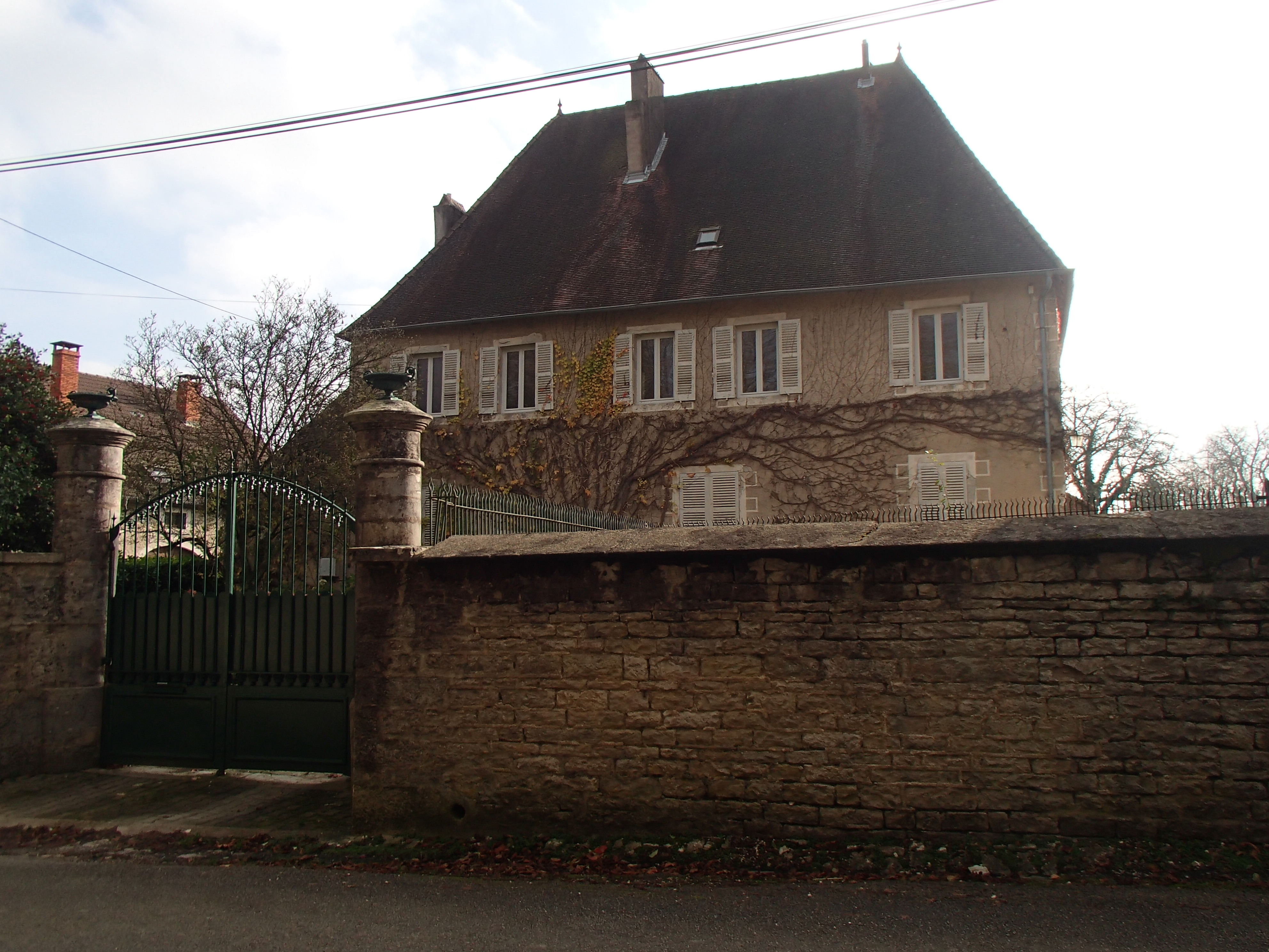 Matherod